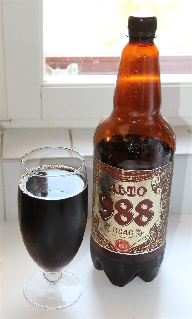 Valkovenäläisen Krinitsa-panimon (ven. Криница ОАО) kvassia (kotikaljaa). Valtiollinen Krinitsa oli vielä 2010-luvun alkupuolella tuotantomäärältään Valko-Venäjän suurin panimoyritys.